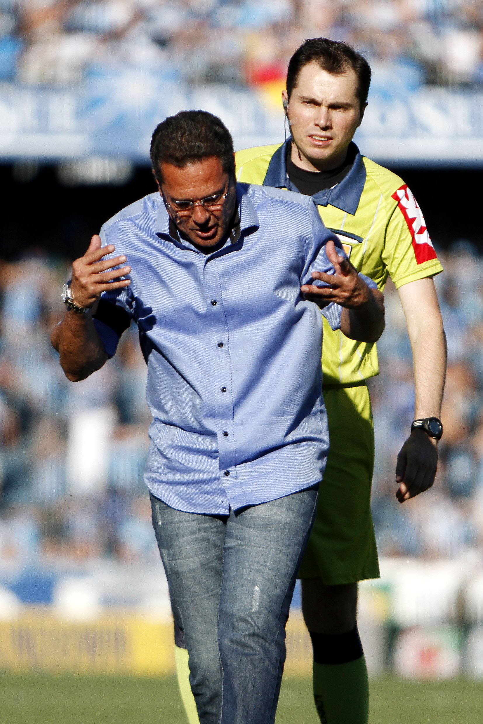 PORTO ALEGRE, RS - FUTEBOL - 02.12.2012 - Luxemburgo é expulso e reclama durante a partida entre Grêmio e Internacional pela última (38ª) rodada do Brasileirão 2012, na tarde desde domingo, no Estádio Olímpico Monumental. Foto: Guilherme Testa